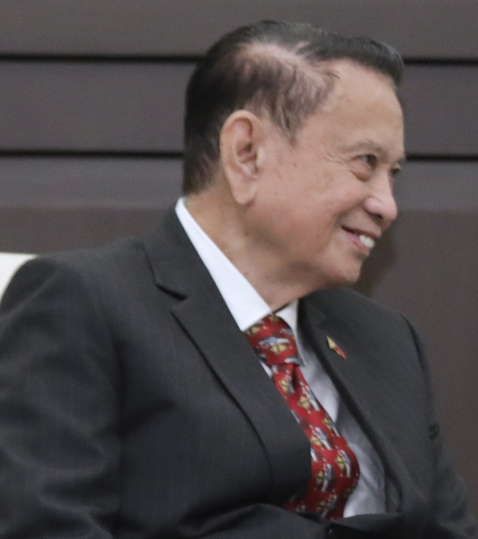 中文（台灣）: 蔡英文總統今（13）日上午接見「玉山論壇」主題演講人及外國學者專家團，菲律賓前副總統金勾納（Teofisto Guingona）、前副總統畢奈（Jejomar Binay）、前外交部長亞塞（Perfecto Yasay）、泰國前外交部長皮羅米亞（Kasit Piromya）、「美國在台協會」前主席薄瑞光（Raymond Burghardt）、美國前駐緬甸大使米德偉（Derek Mitchell）、新加坡南洋理工大學拉惹勒南國際學院副院長艾默斯（Ralf Emmers）、印尼國家科學院社會科學與人文研究所副所長蒲佳斯徒蒂（Tri N. Pudjiastuti）、緬甸發展研究所所長葉平興敏（Min Ye Paing Hein）及菲律賓前副總統辦公室首席顧問唐索（Jose Tanso）